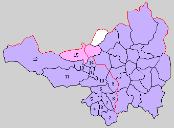 岩手県西磐井郡の町村。